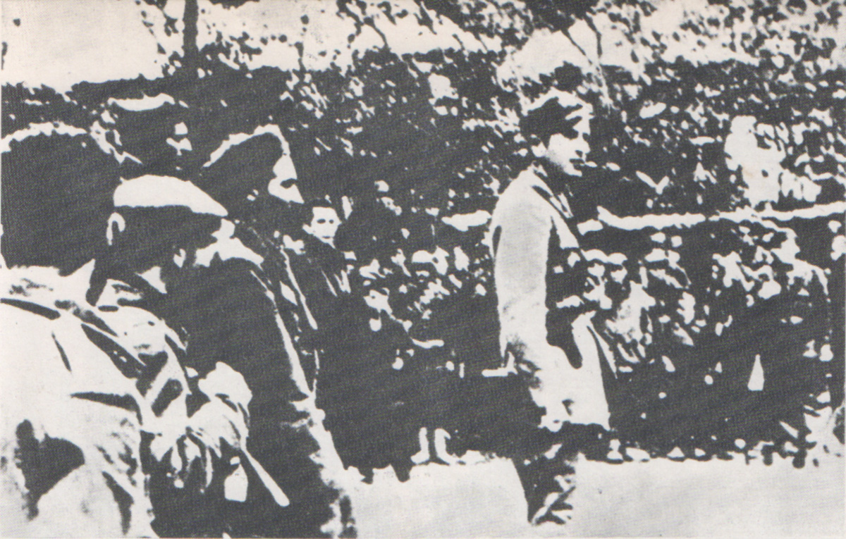 Srpskohrvatski / српскохрватски: Drug Tempo pozdravlja Prvu makedonsku brigadu i grčke partizane u dolini Karadžove (Egejska Makedonija u Grčkoj) 1943.